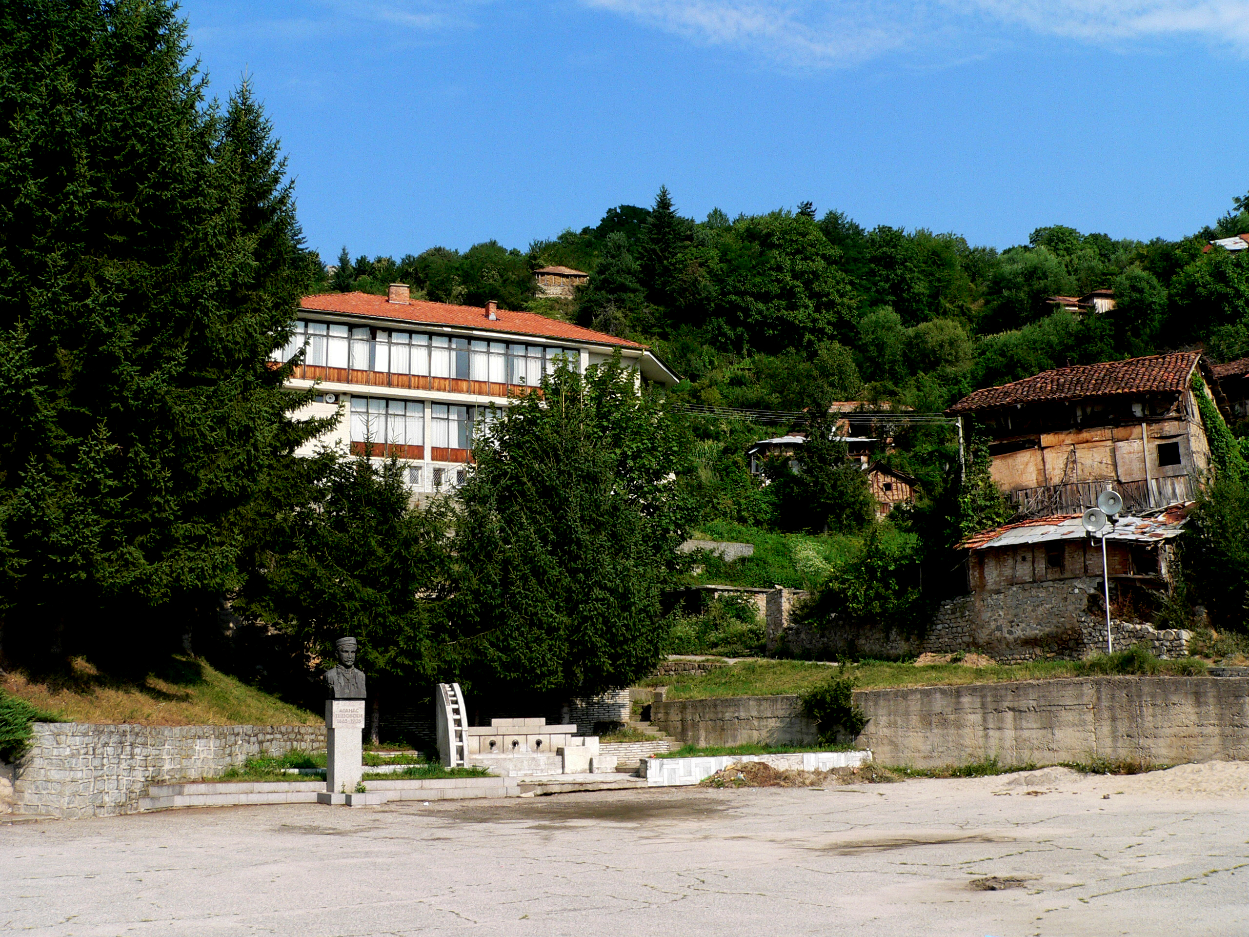 Паметникът на Атанас Тешовски в с. Тешово